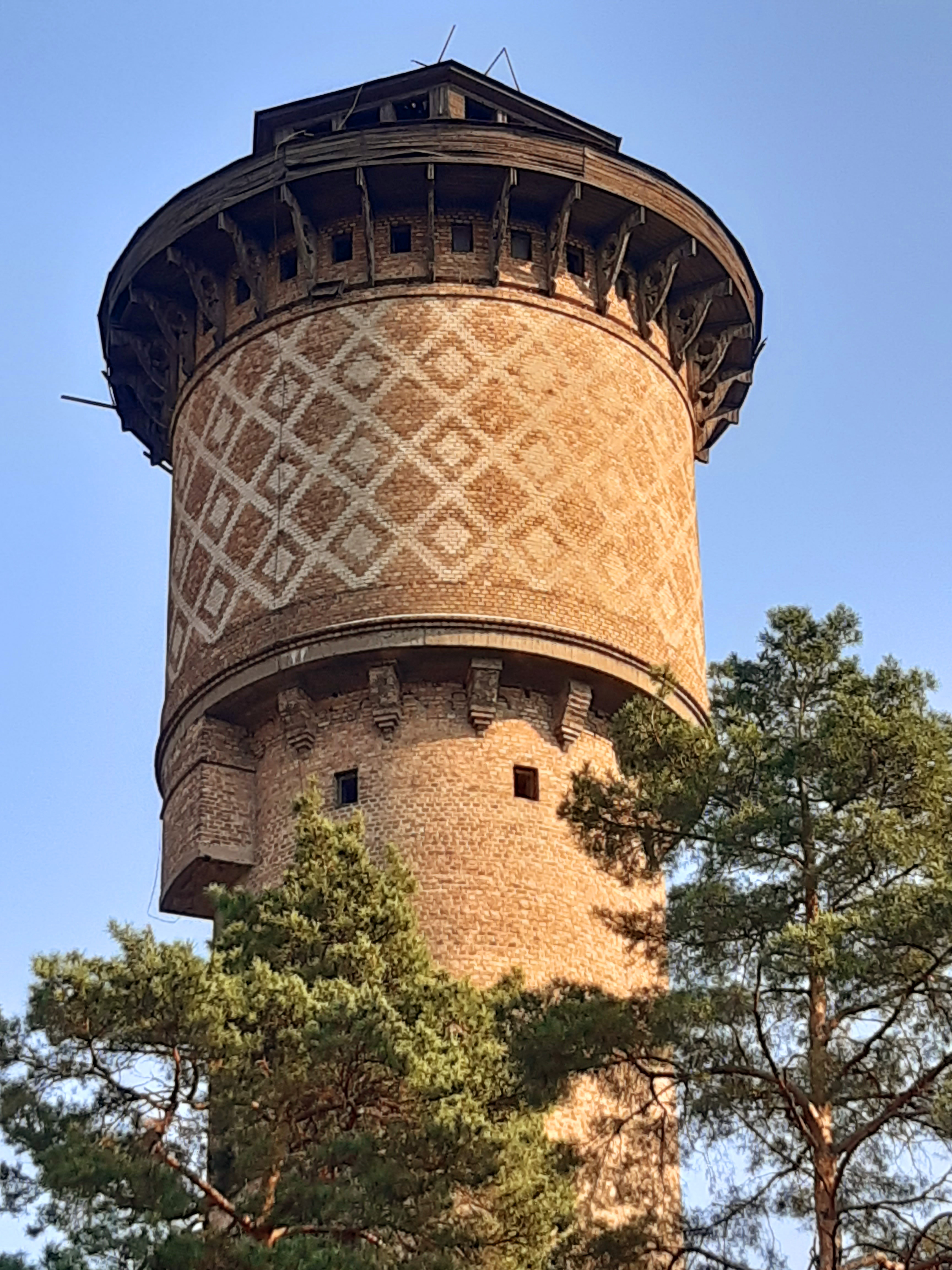 Водонапірна вежа (орнамент). ДВРЗ, Київ